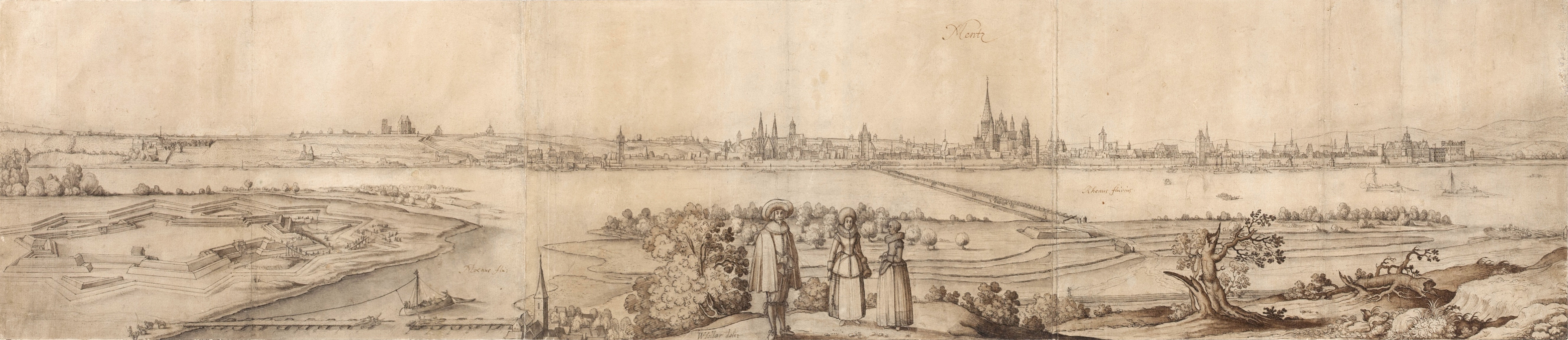 Václav Hollar: Velký pohled na Mohuč (1632-1636), kresba perem a štětcem, sestaveno ze tří částí, 211x379, 211x38, 211x363 mm, Národní galerie v Praze